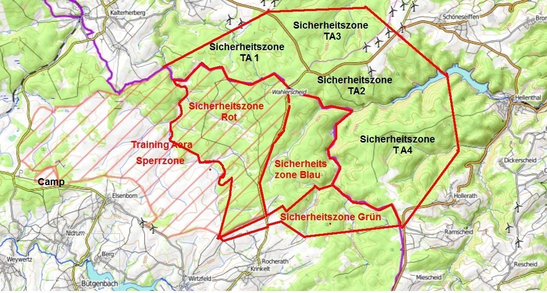 TrÜbPl Elsenborn 2015, Camp, Trainings Aera, Sperr- und Sicherheitszonen